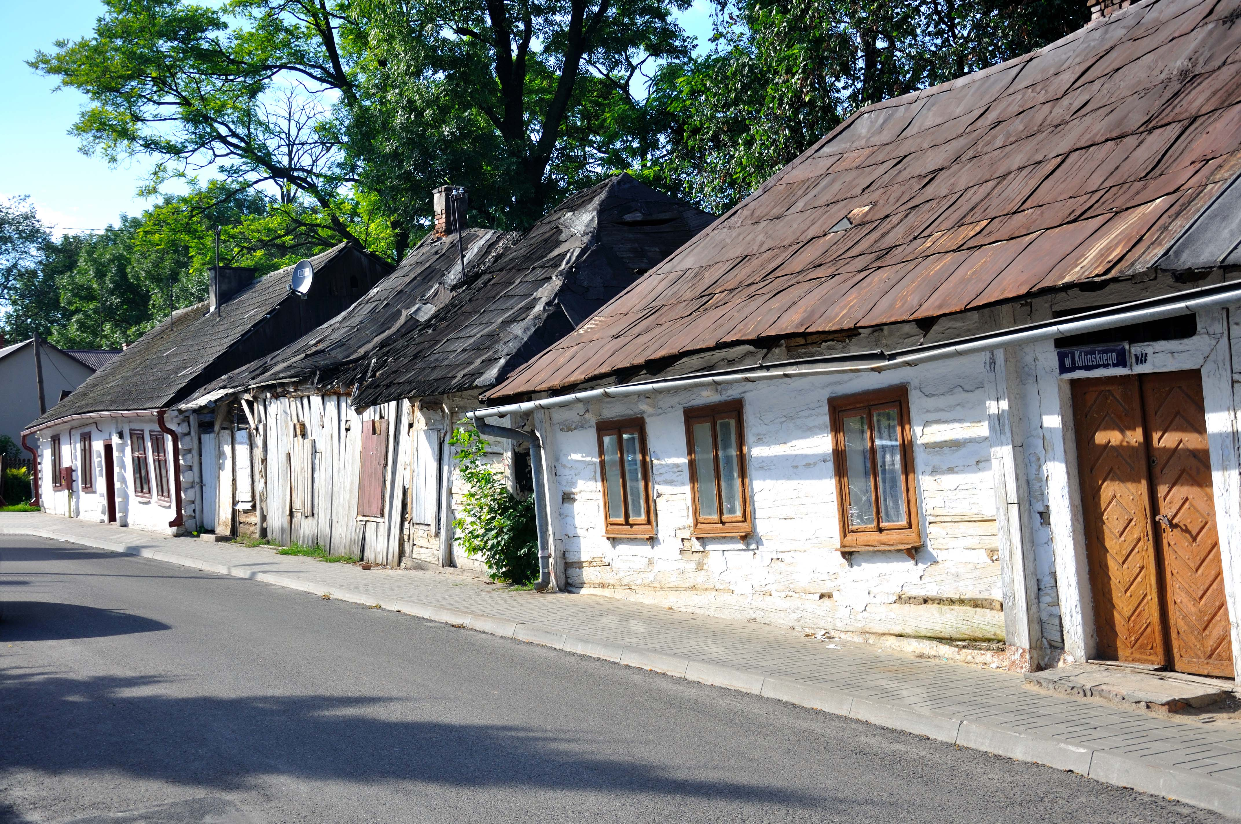 Zabytkowe domy na ul Kilińskiego w Przeworsku 06.2009.